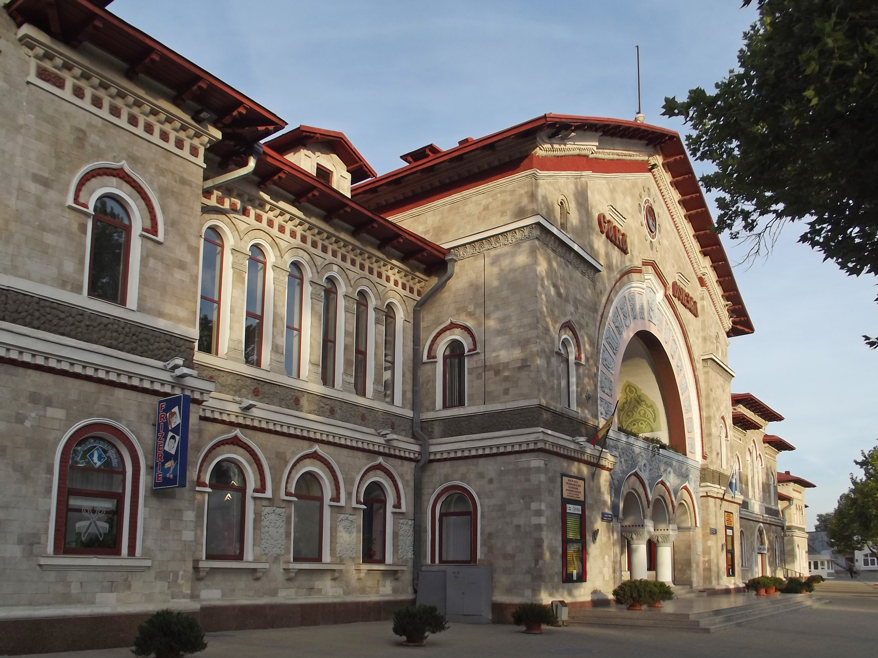 Железнодорожный вокзал